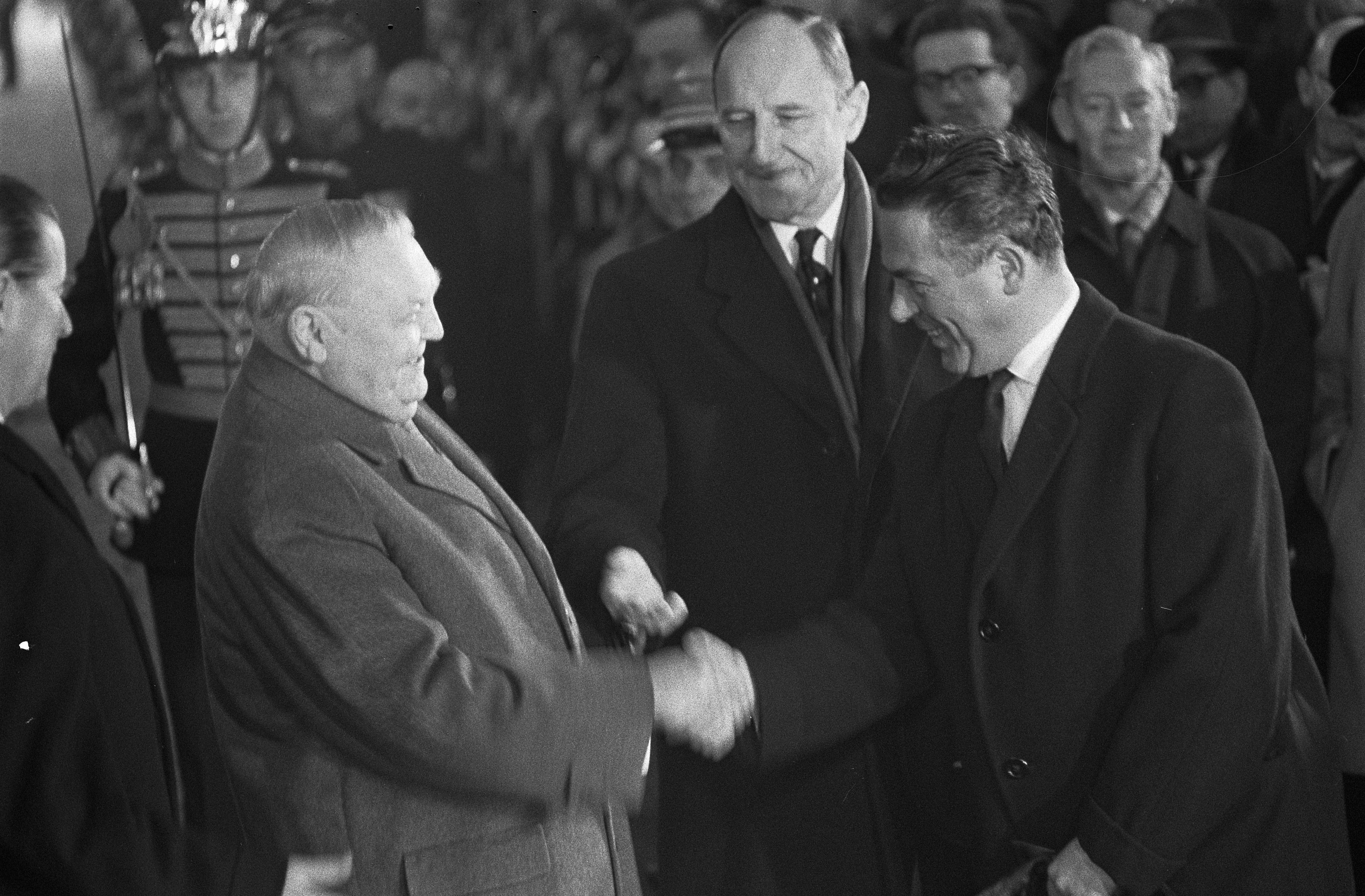 Collectie / Archief : Fotocollectie Anefo Reportage / Serie : [ onbekend ] Beschrijving : Bondskanselier Ludwig Erhard in Holland, bondskanselier Erhard bracht bezoek aan Catshuis, Erhard, Marijnen, Schroder, Luns Datum : 2 maart 1964 Trefwoorden : bondskanseliers Persoonsnaam : Erhard Ludwig, Luns, J.A.M.H., Luns, Joseph, Schroder Fotograaf : Pot, Harry / Anefo Auteursrechthebbende : Nationaal Archief Materiaalsoort : Negatief (zwart/wit) Nummer archiefinventaris : bekijk toegang 2.24.01.05 Bestanddeelnummer : 916-1277